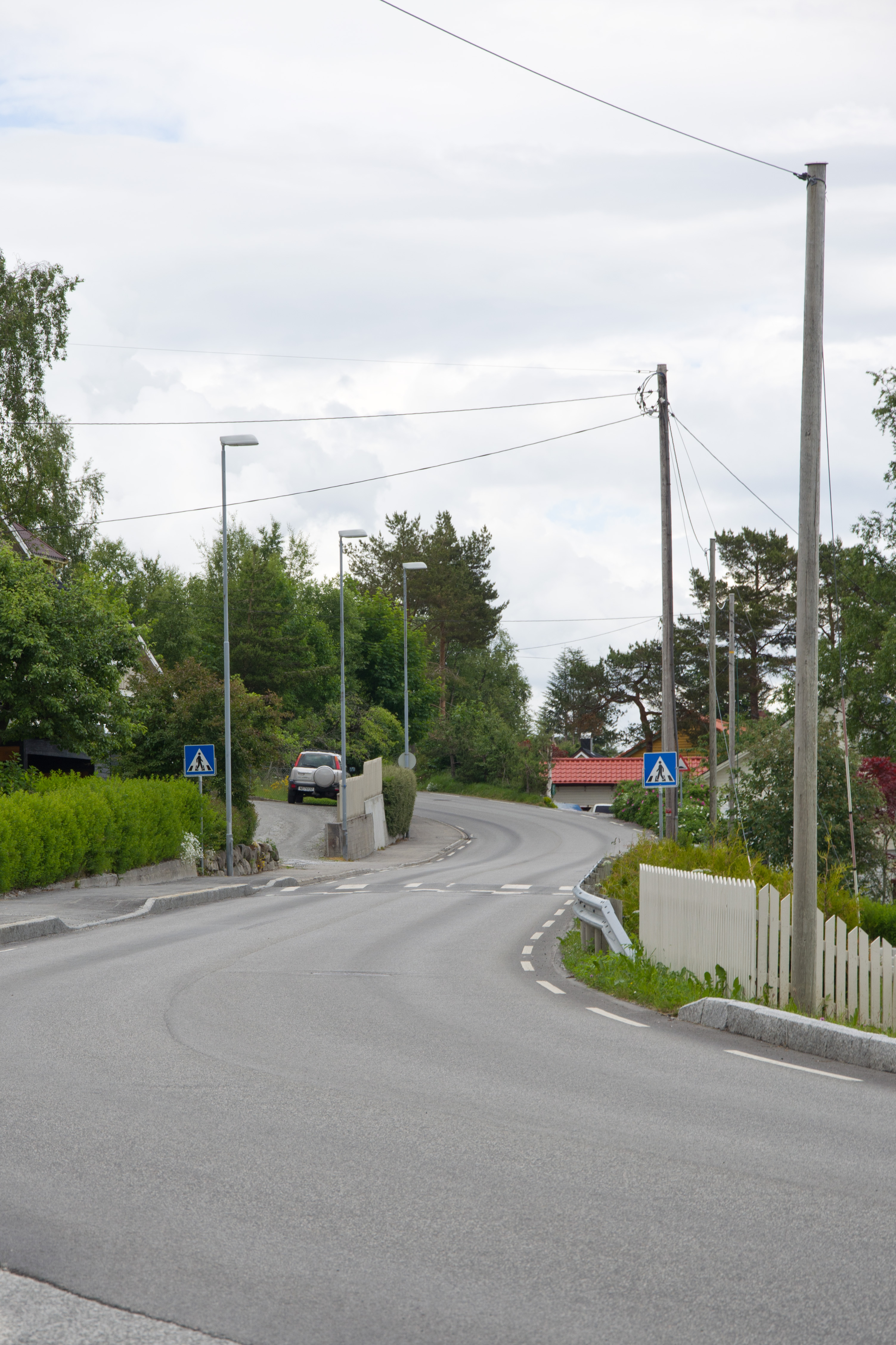 Fylkesvei 404 Kviltorpveien i Molde i Møre og Romsdal fylke.